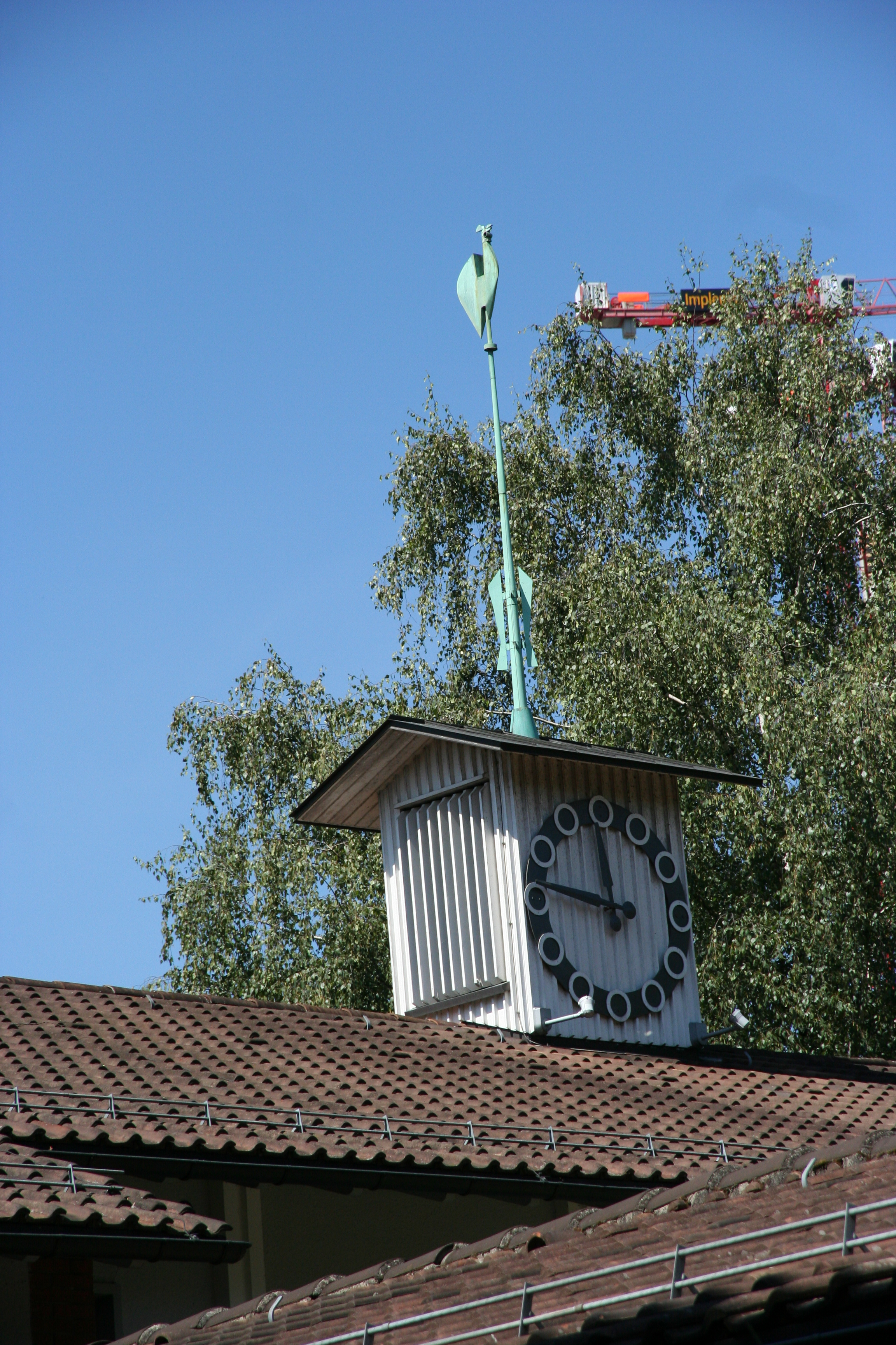 Evangelisch-reformierte Kirche Letten in Zürich-Wipkingen